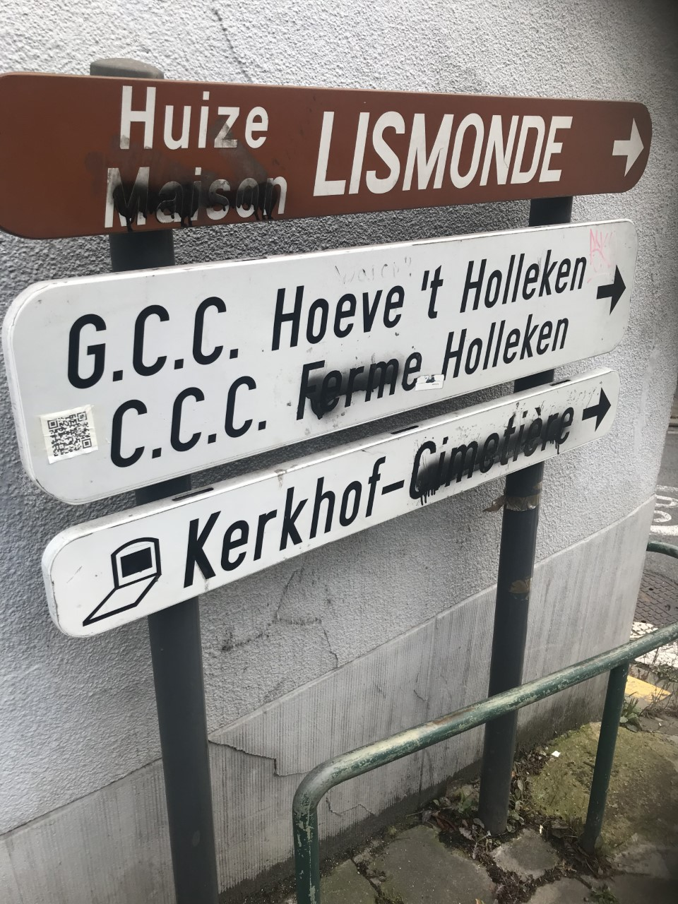 Signes de la route vandalisés à Linkebeek